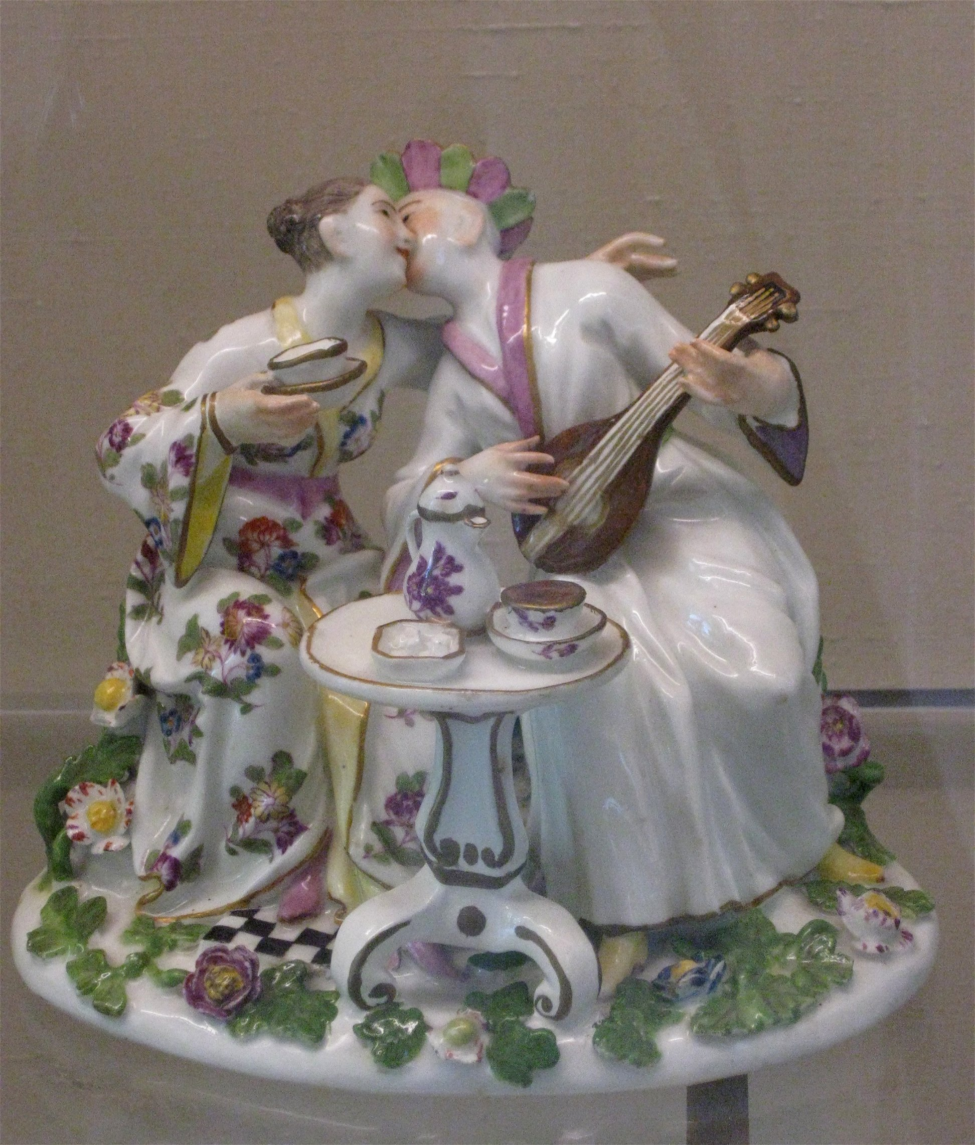 "Indianisches" Liebespaar am Kaffetisch, Modell von Johann Joachim Kaendler, um 1745